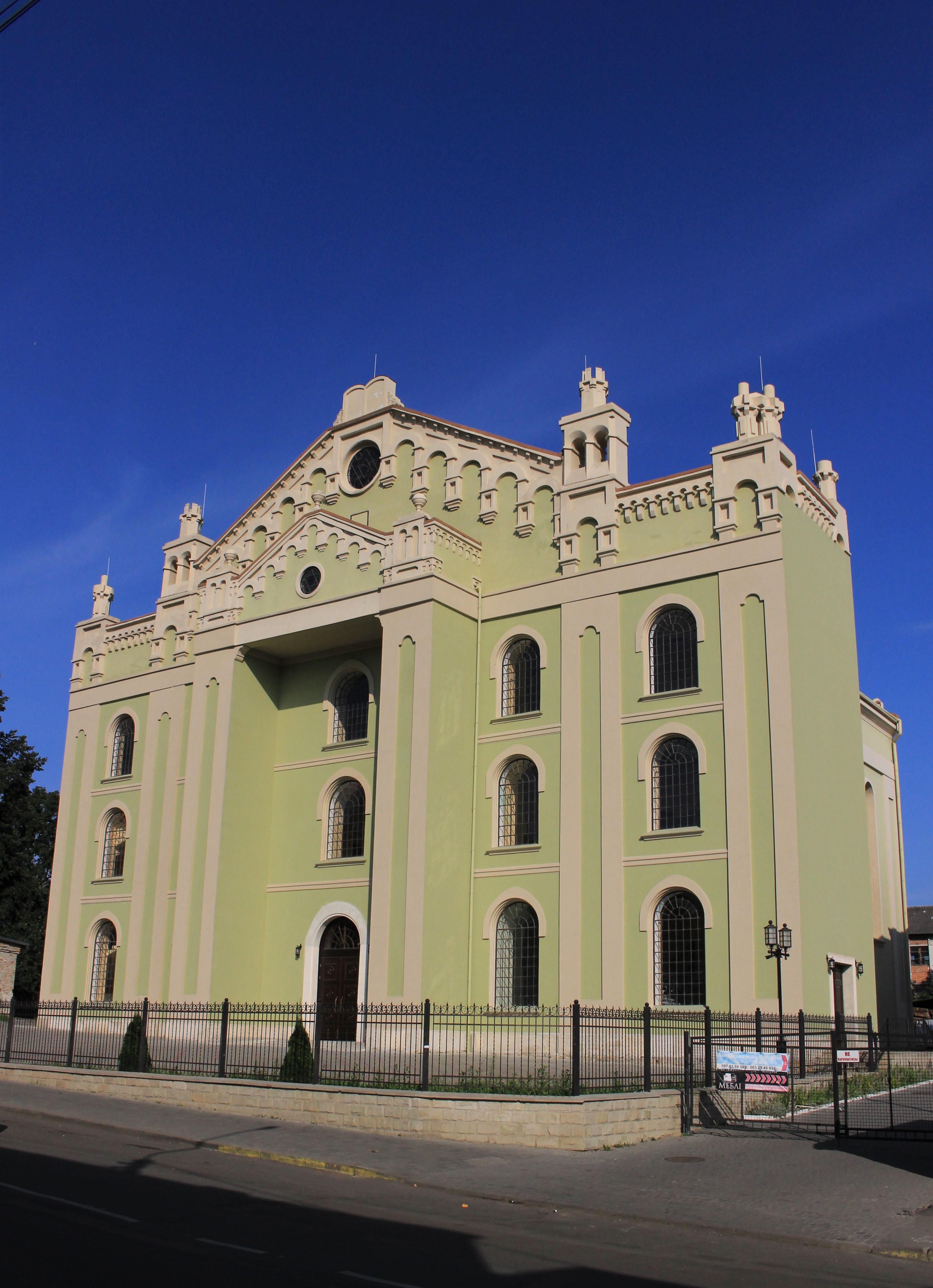 Хоральна синагога (Дрогобич), Дрогобич, вул. Пилипа Орлика, 6